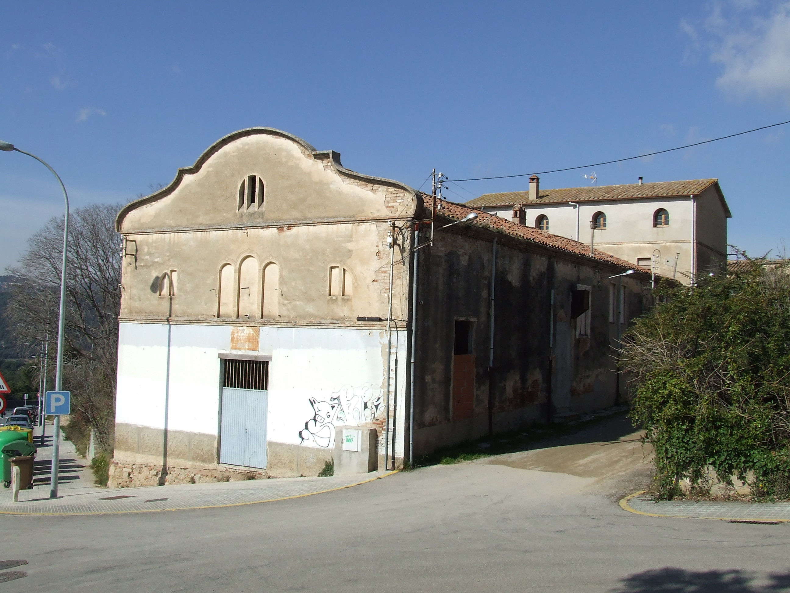 El Teatre de la Unió (Bigues, Bigues i Riells, Vallès Oriental).